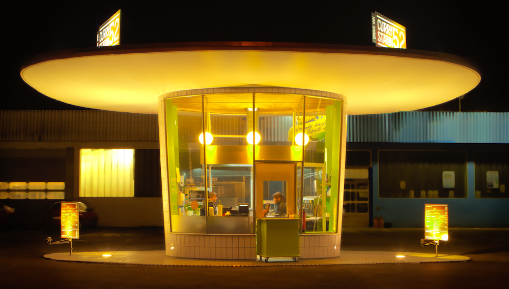 Zu sehen ist der Feinkost Schnellimbiss Curry52 in Dorsten. Bochumer Straße 52, Dorsten Feldmark, Nordrhein-Westfalen This is a photograph of an architectural monument.